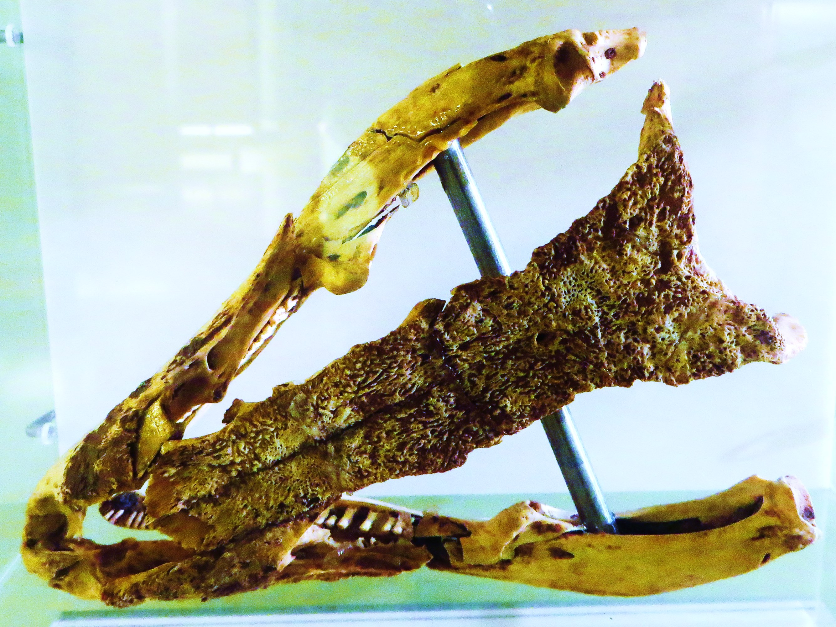 Fossil of Gallotia, an extinct reptile- Took the picture at Museo de la Naturaleza y el Hombre - Tenerife